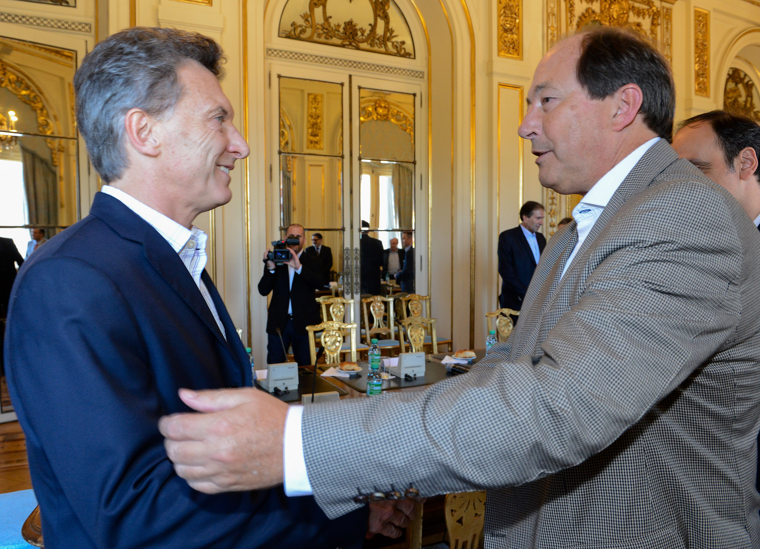 Mauricio Macri junto a Ernesto Sanz en la Casa Rosada